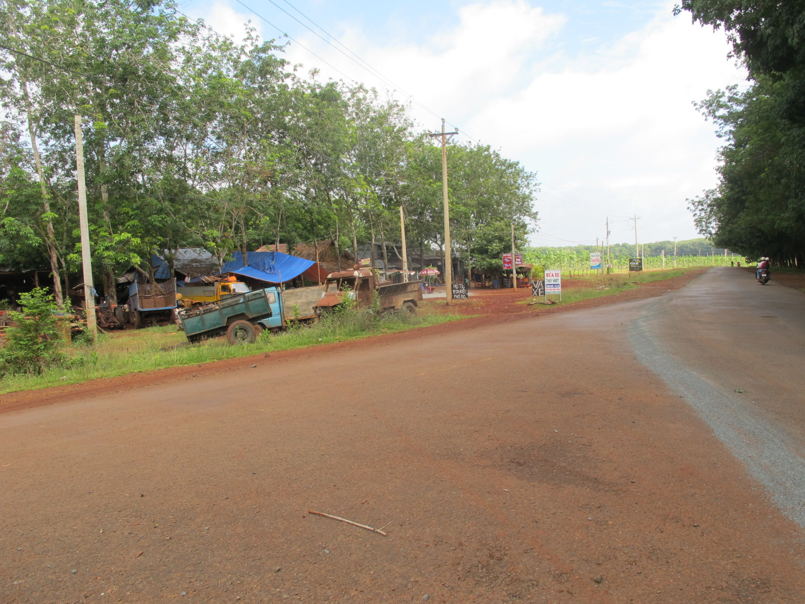 Tân Lợi, Hớn Quản, Binh Phuoc province, Vietnam